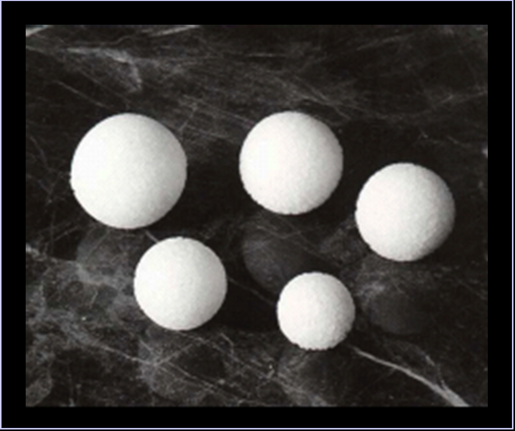 Los implantes porosos se presentan en diámetros de 12 a 22 mm.